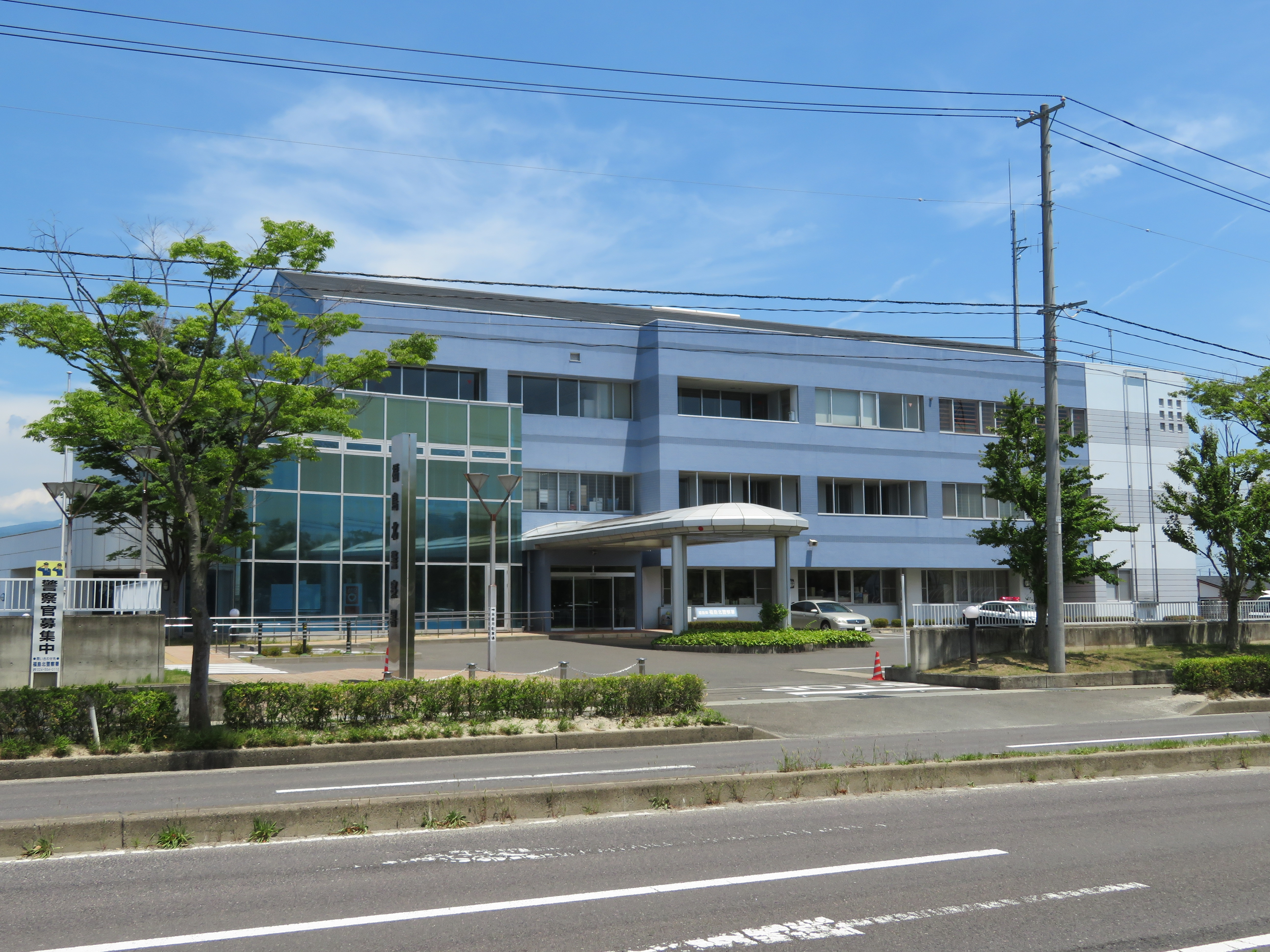 福島北警察署庁舎 Canon PowerShot SX720 HS